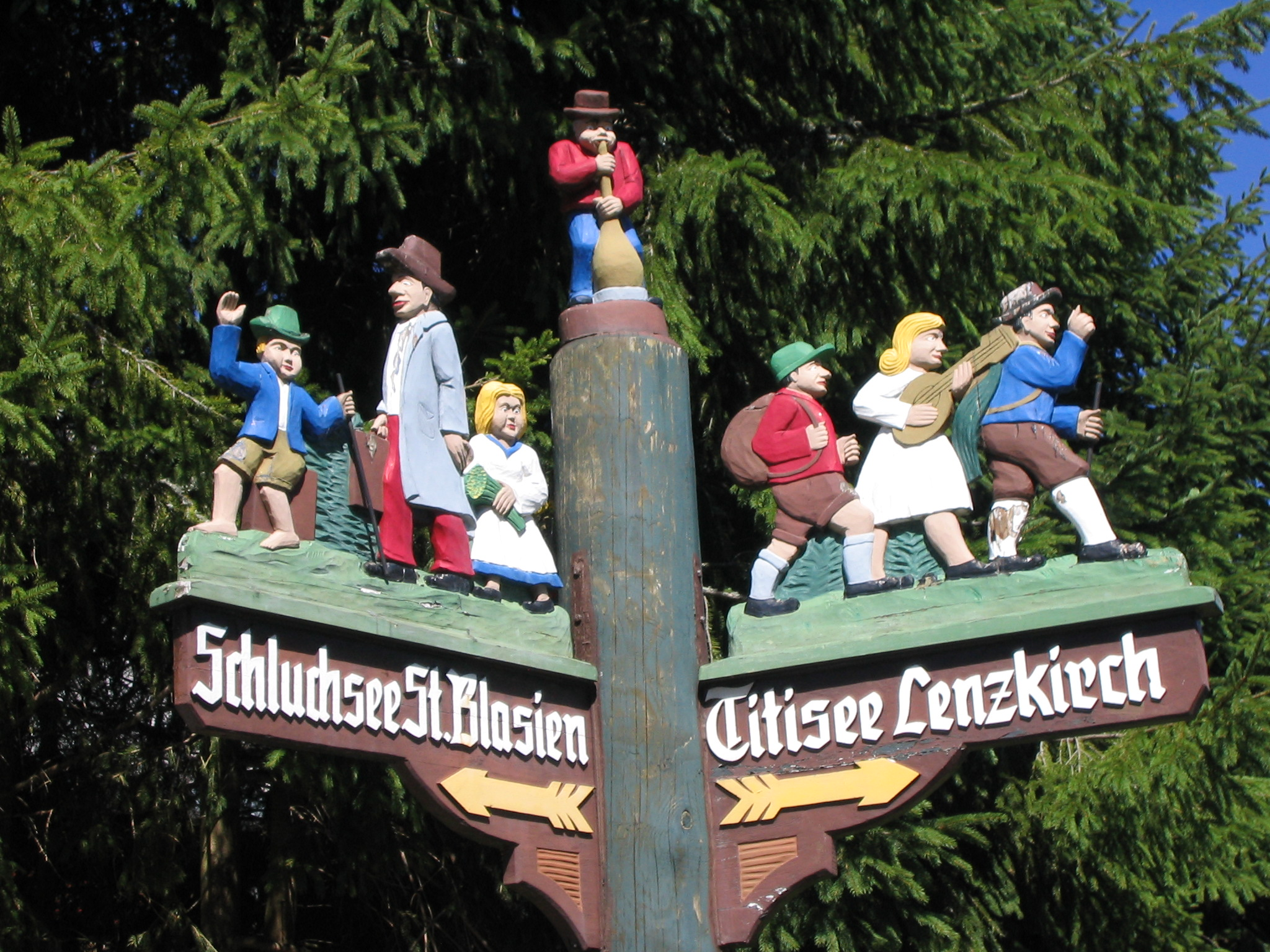 Wegweiser nach Schluchsee/St. Blasien bzw. Lenzkirch in Feldberg-Altglashütten